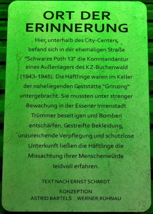 Gedenktafel der Gedenkstätte des KZ-Außenlagers Essen, Schwarze Poth, heute unter der Porschekanzel